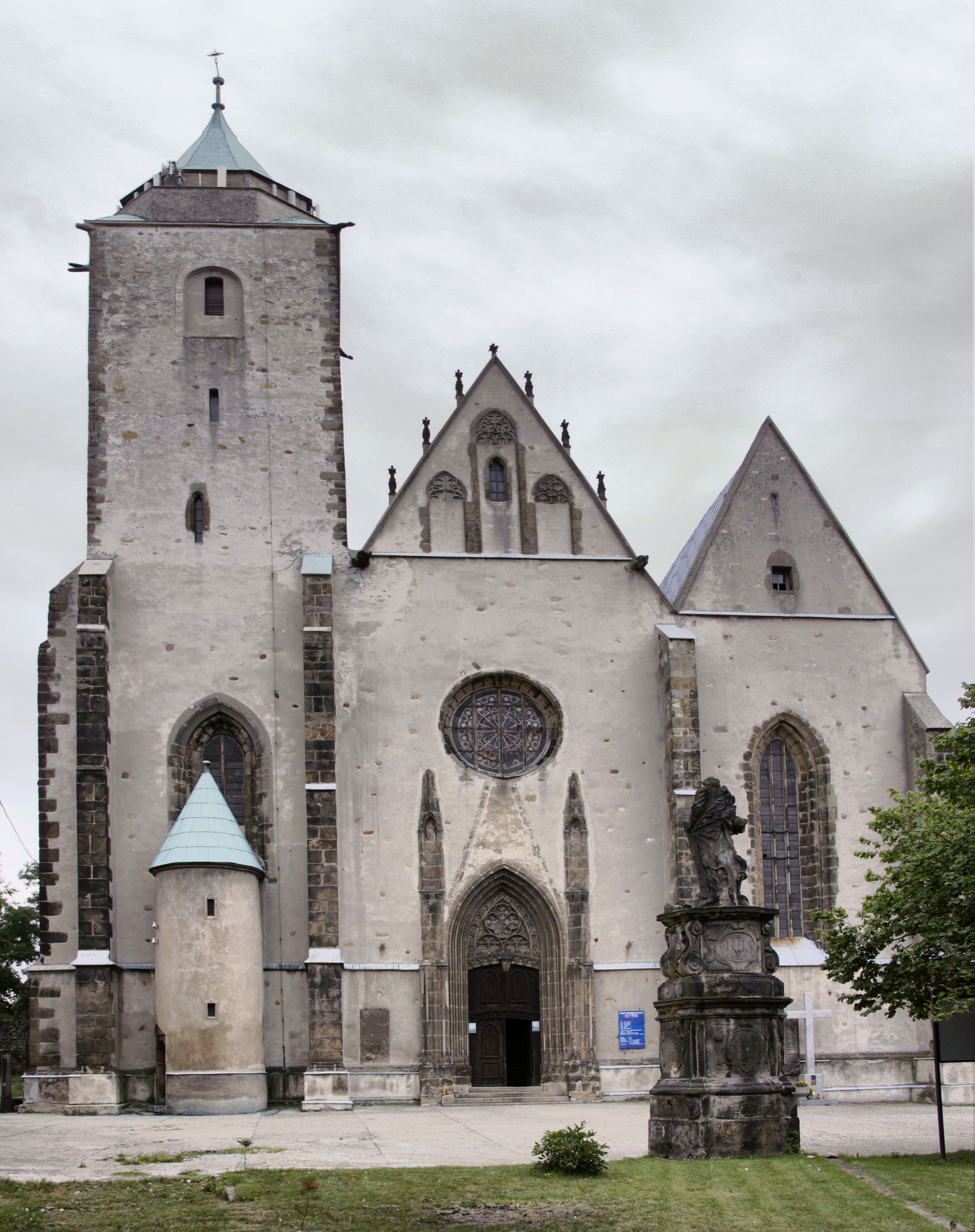 Jawor, pl. Kościelny - kościół parafialny p.w. św. Marcina, XIII-XIX (zabytek nr rejestr. A/1899/79)